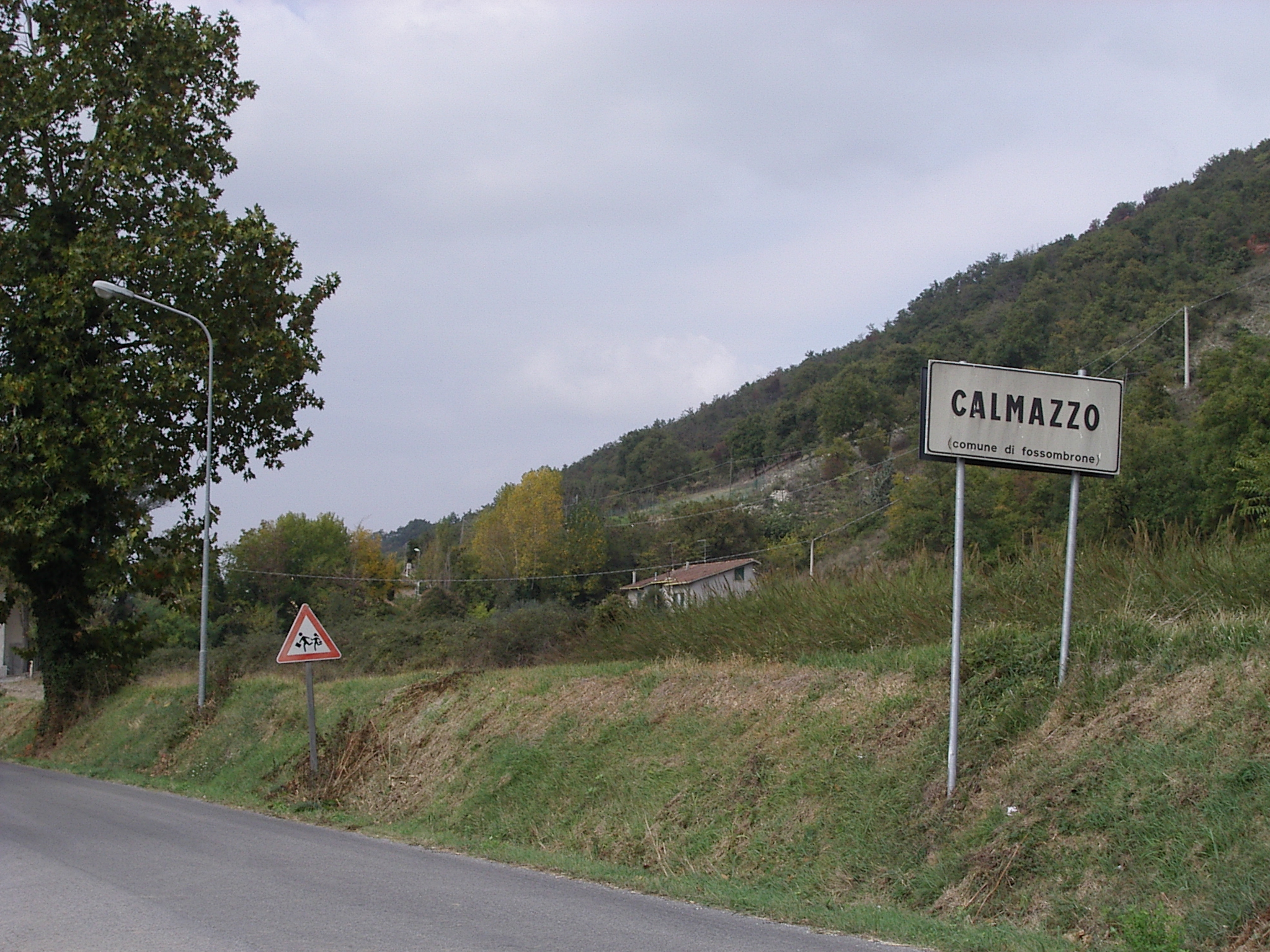 Lieu de la bataille de Calmazzo Province de Pesaro Urbino Marches Italie